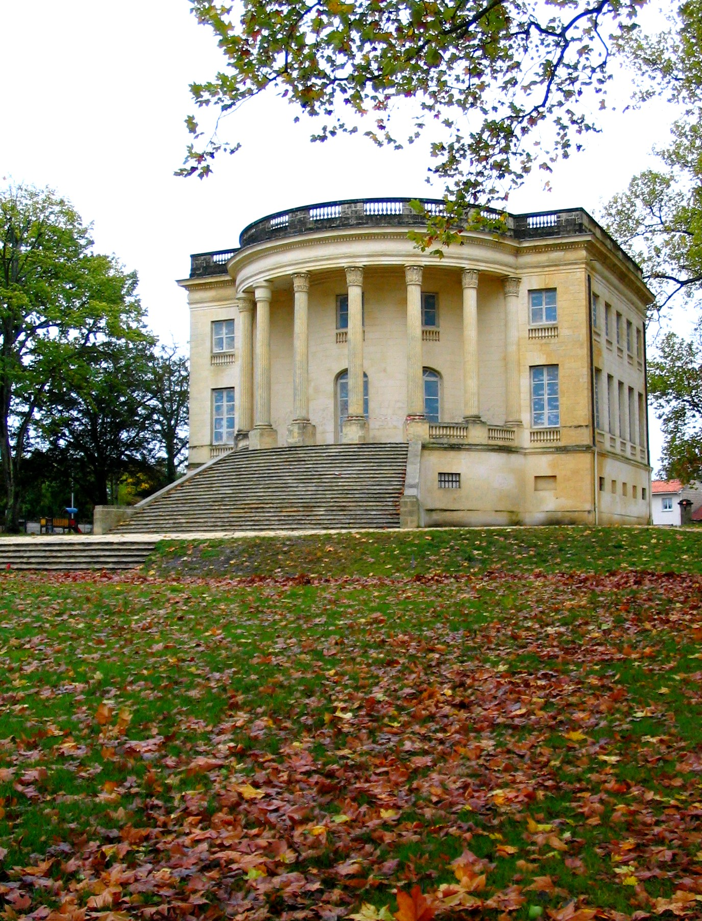 Maison carrée d'Arlac, façade sud, Gironde, France